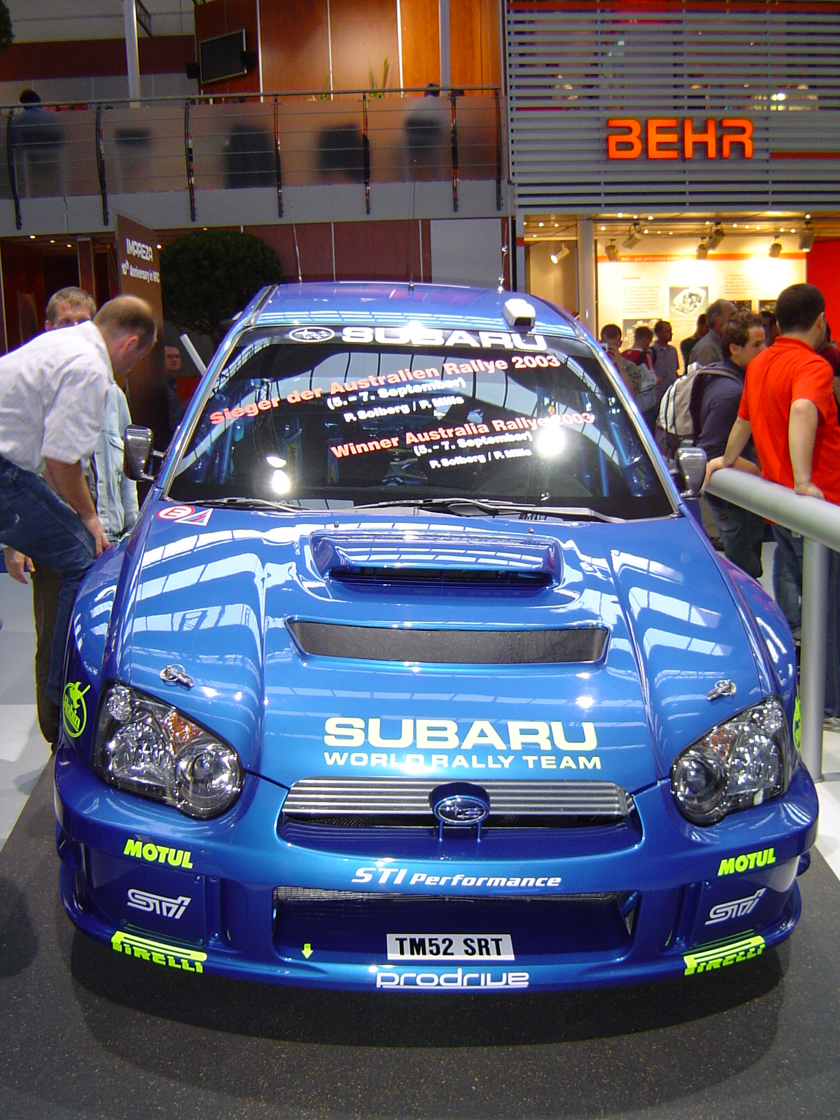 IAA_2003_019